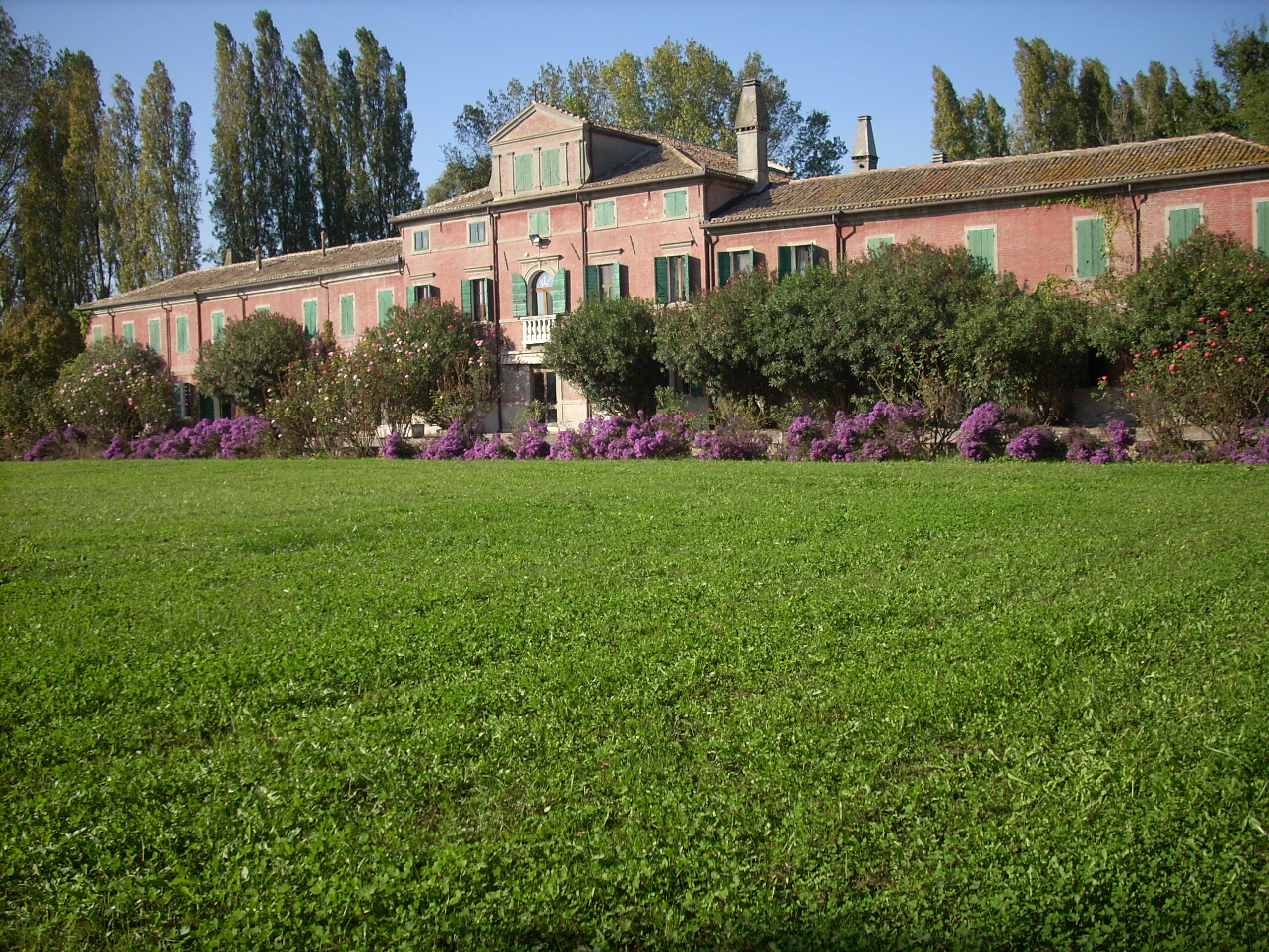 Ca' Zen a Taglio di Po